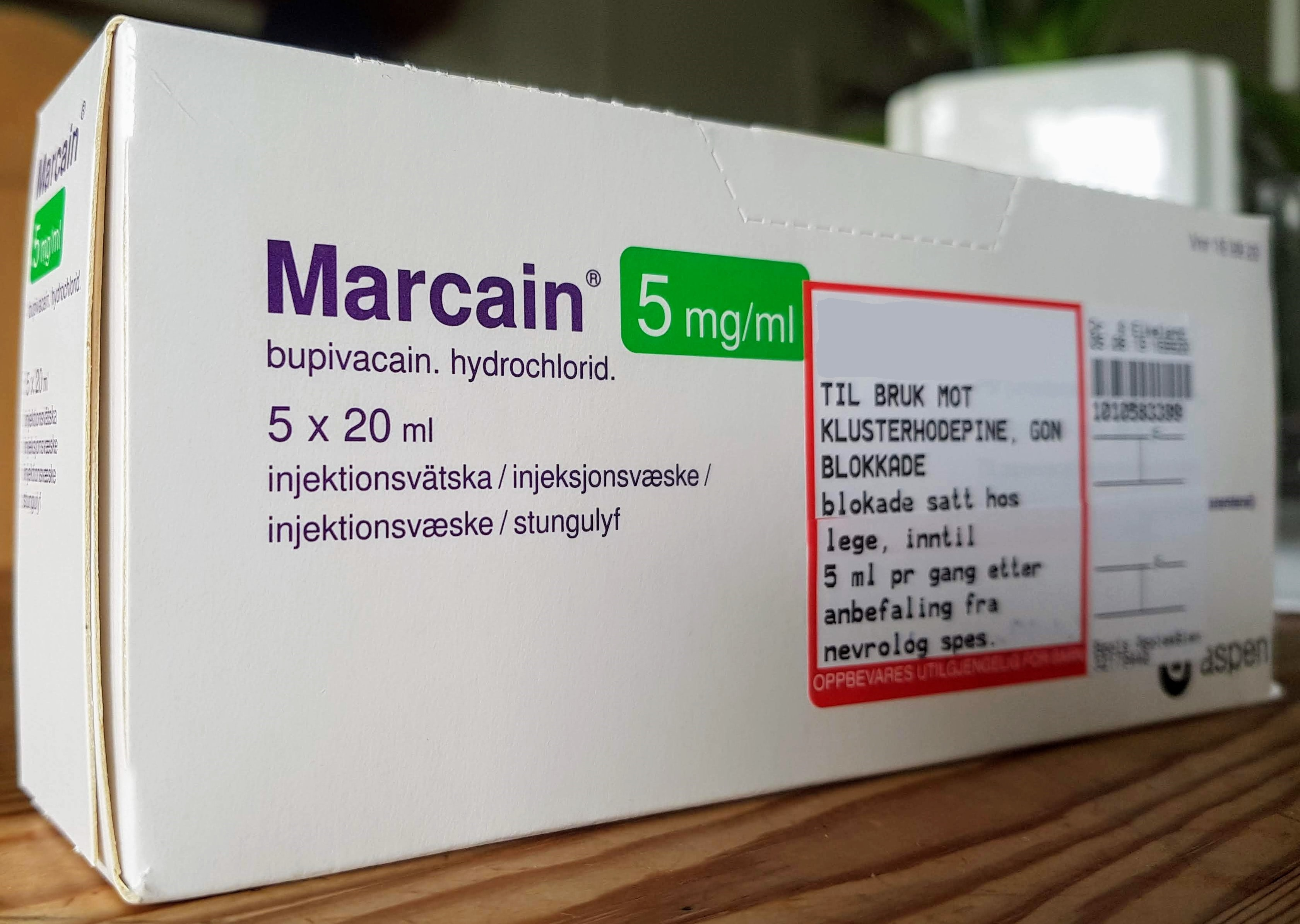 Pakning med 5 x 20 ml beholdere med lokalbedøvelse av typen Marcain 5 mg/ml. Inneholder virkestoffet bupivacain, som blant annet brukes til regionalbedøvelser, for eksempel nerveblokader